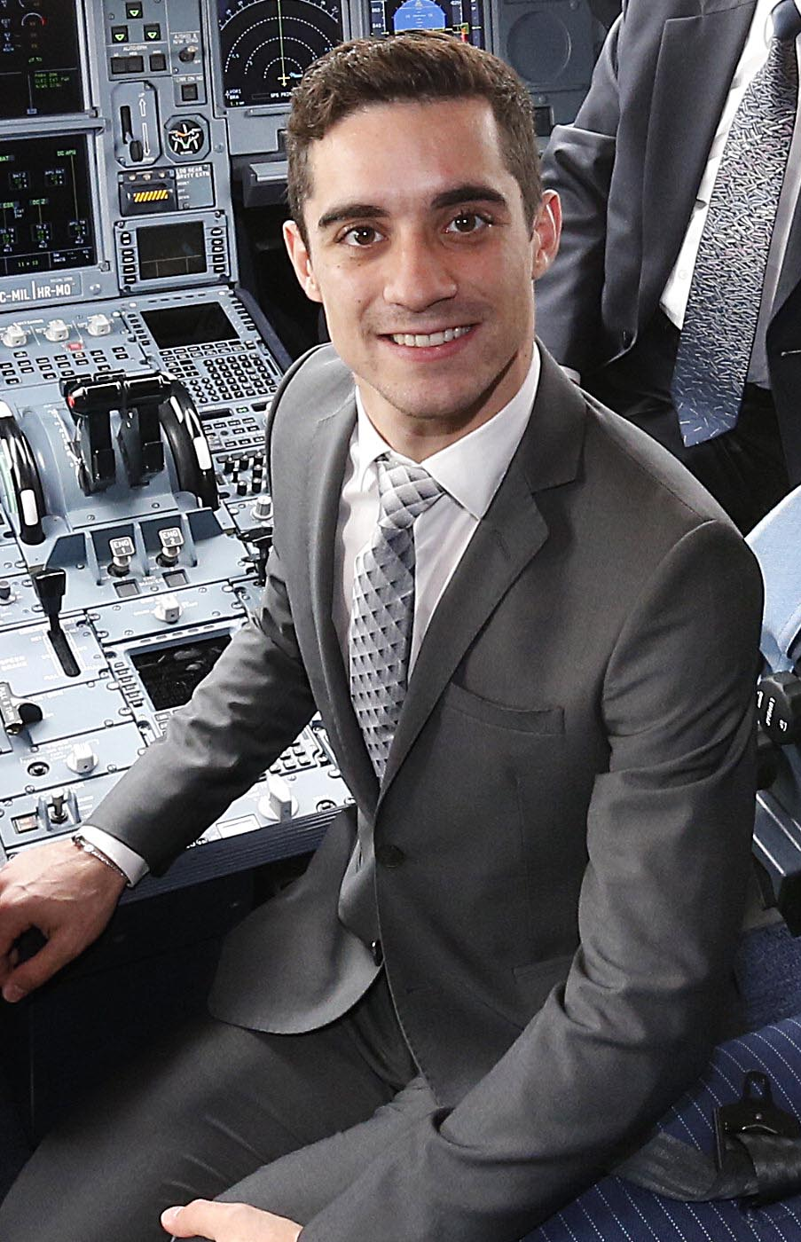 Madrid y Tokio vuelven a estar, desde mañana, unidas en vuelo directo. Hoy ha tenido lugar la presentación de esta nueva línea, y hemos visitado el avión que mañana realizará el primer vuelo, vinilado con el lema 'Madrid, el corazón de España'. Avanzamos en el compromiso de promover mejoras en las conexiones aéreas con la incorporación de esta nueva línea directa con el continente asiático. Y continuamos comprometidos con el turismo de calidad, fuente de riqueza y generación de empleo. A partir de mañana, un nuevo puente se abre entre España y Japón, cuyos turistas han demostrado querer y sentir nuestro país. Bienvenidos a Madrid.